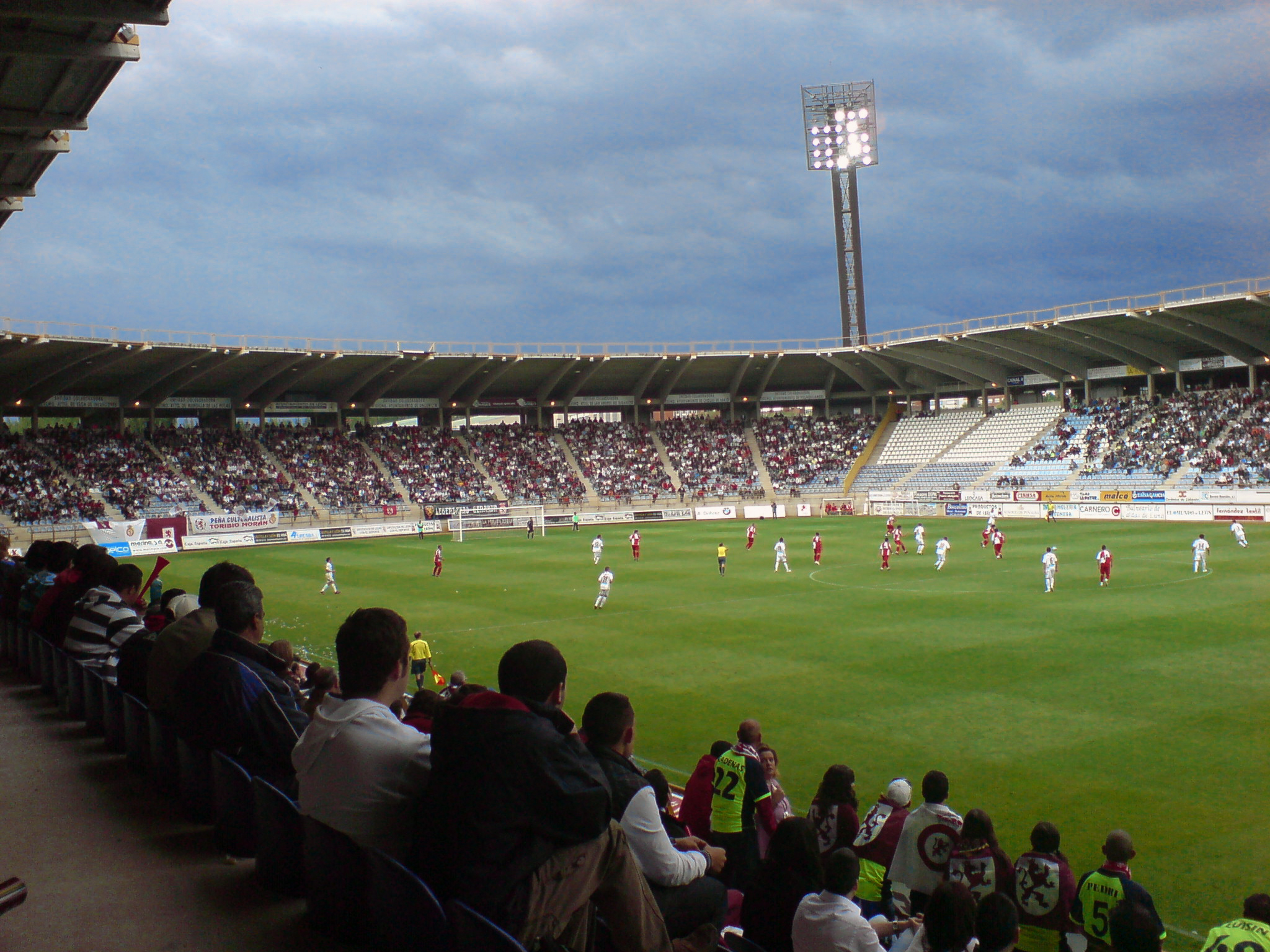 Estadio Reino de León, en el playoff de ascenso a segunda división de la Cultural y Deportiva Leonesa contra el C.E. Sabadell.